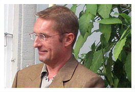 Foto des Künstlers Christoph Kappesser